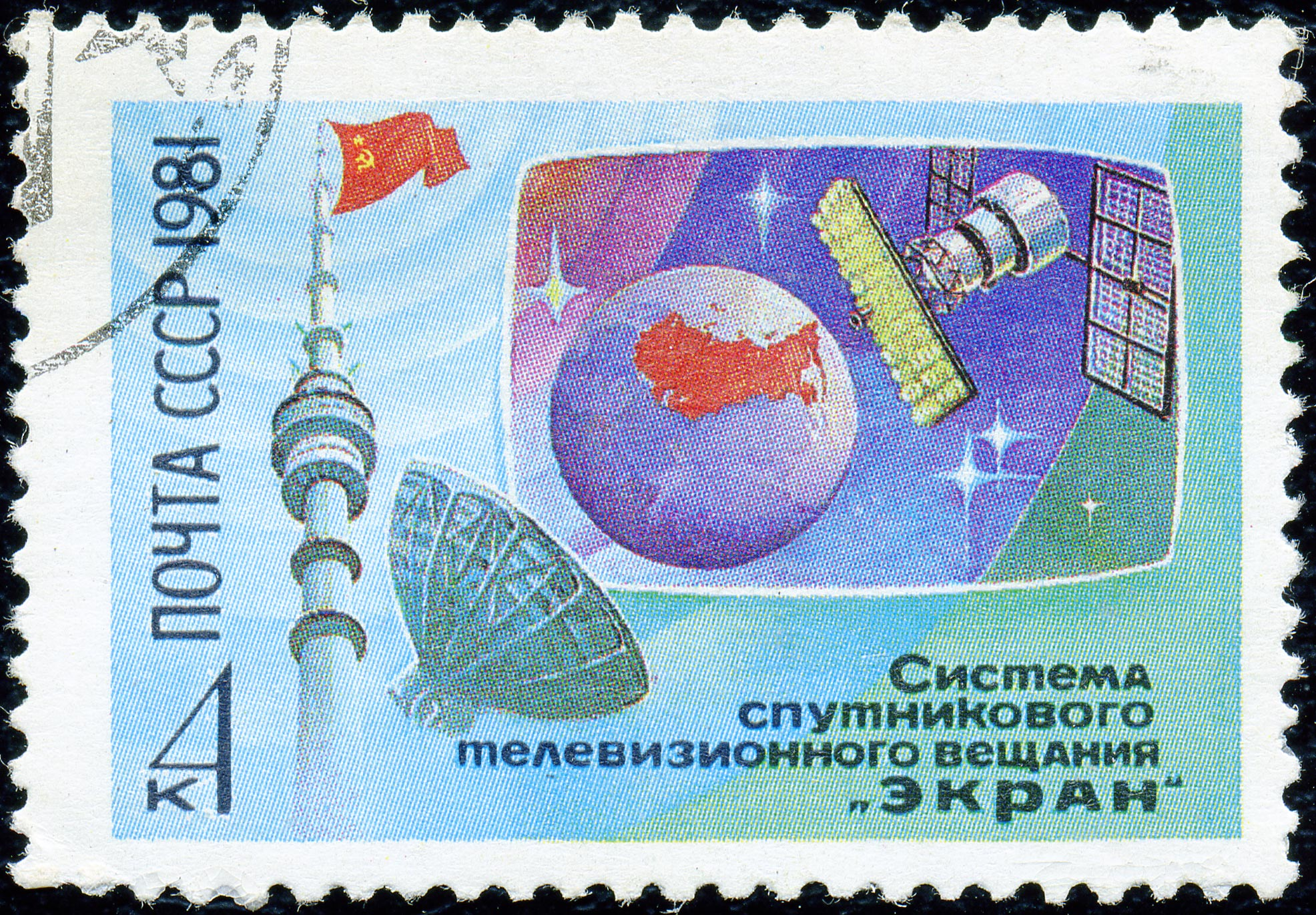 Почтовая марка СССР. 1981. Система спутникового телевидения Экран.jpg